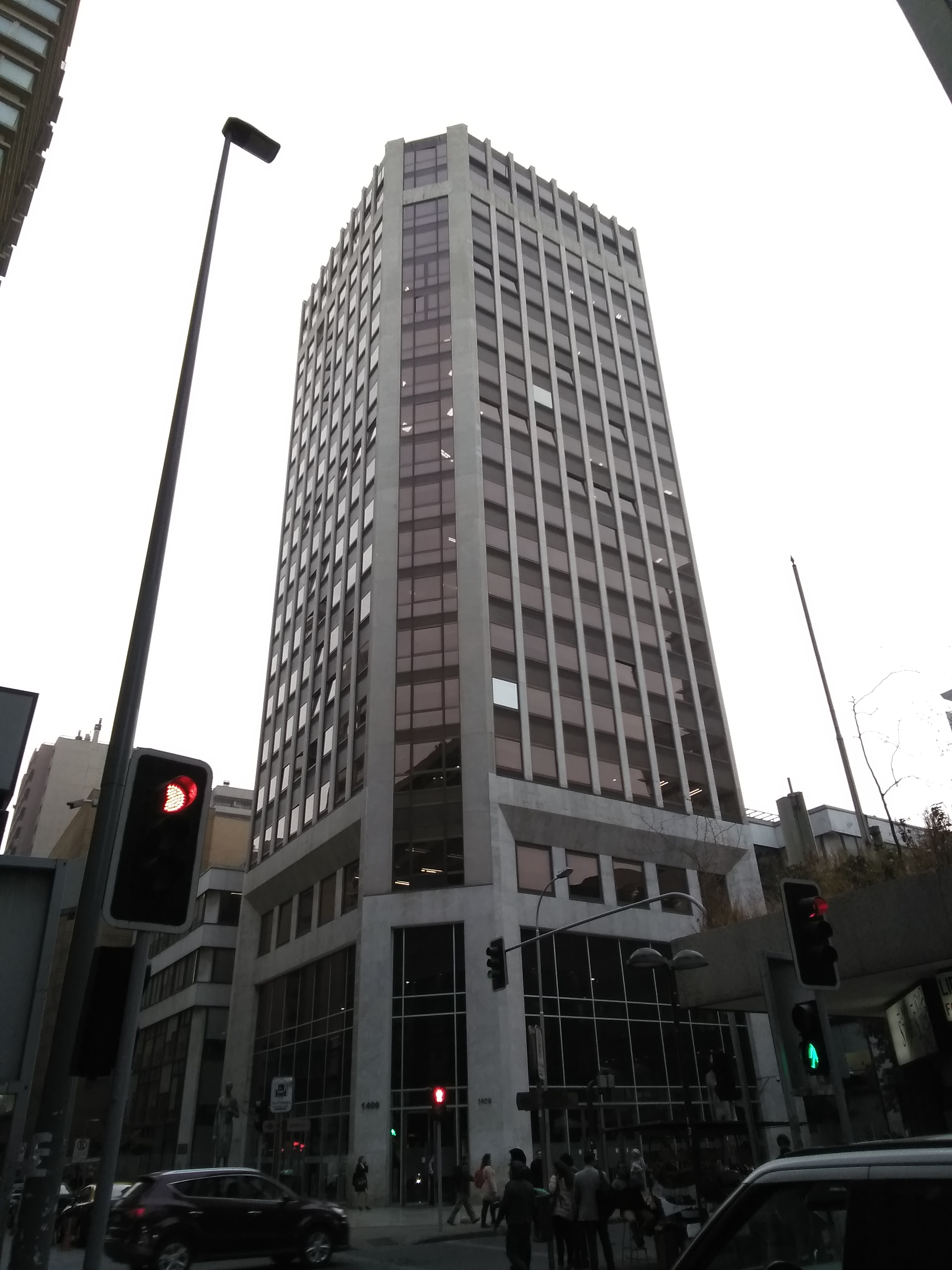 Edificio de los Juzgados Civiles de Santiago. Fue construido originalmente como edificio corporativo del Banco Unido de Fomento (BUF), el cual no alcanzó a ocuparlo tras su quiebra en 1983.